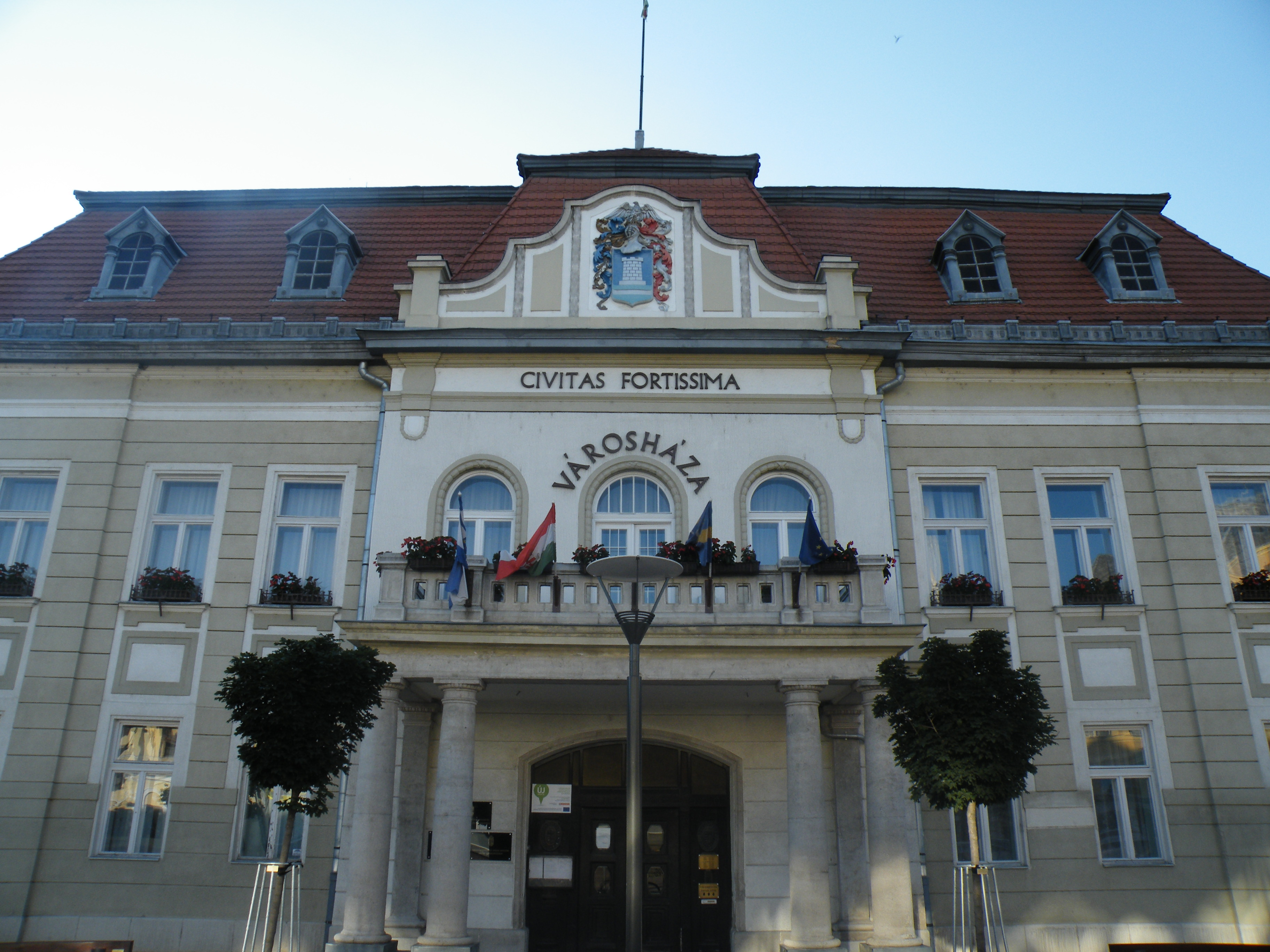 Balassagyarmati Városháza